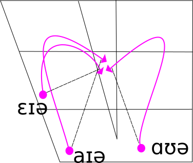 tryftongi i tendencje dyftongizacyjne